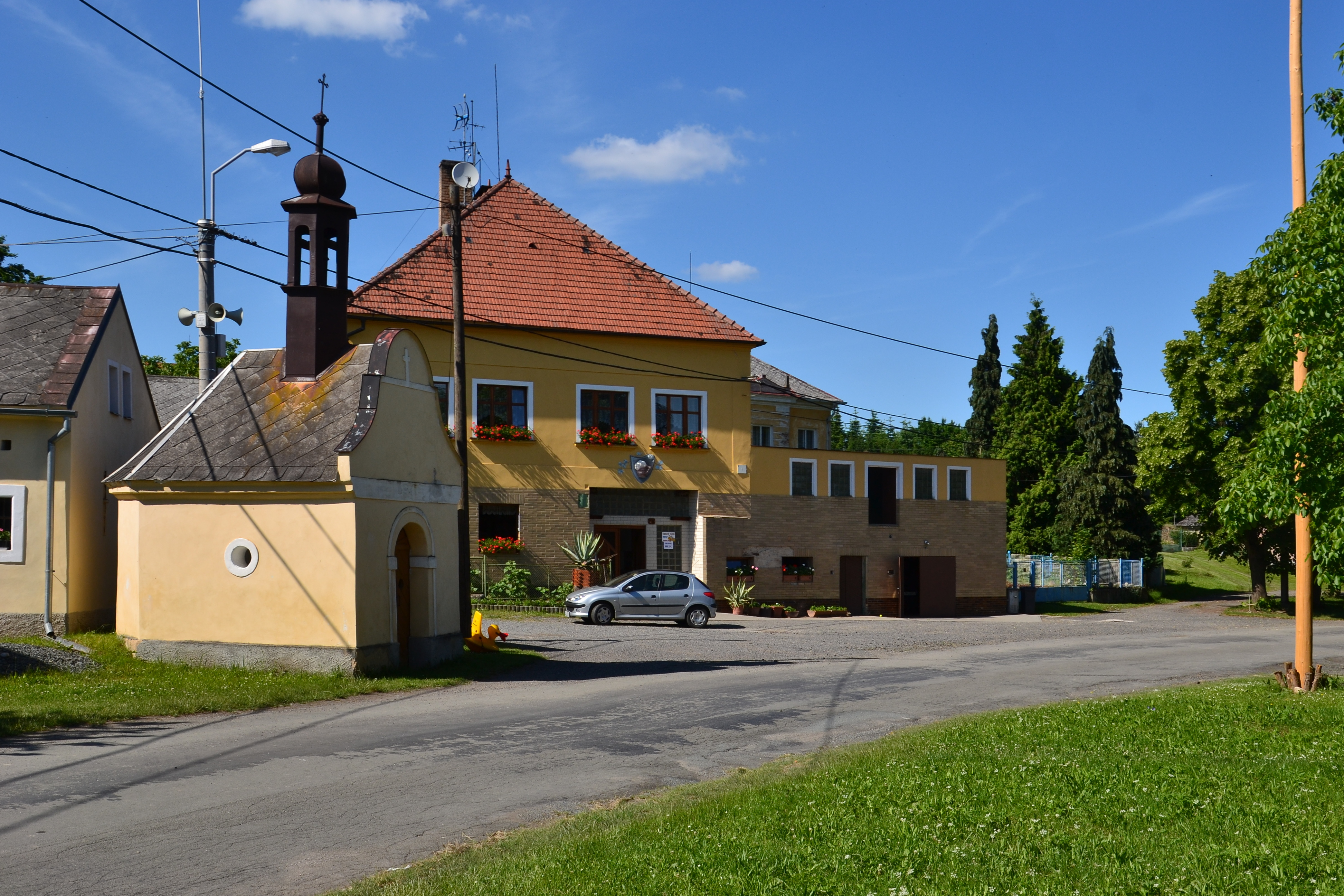 Náves